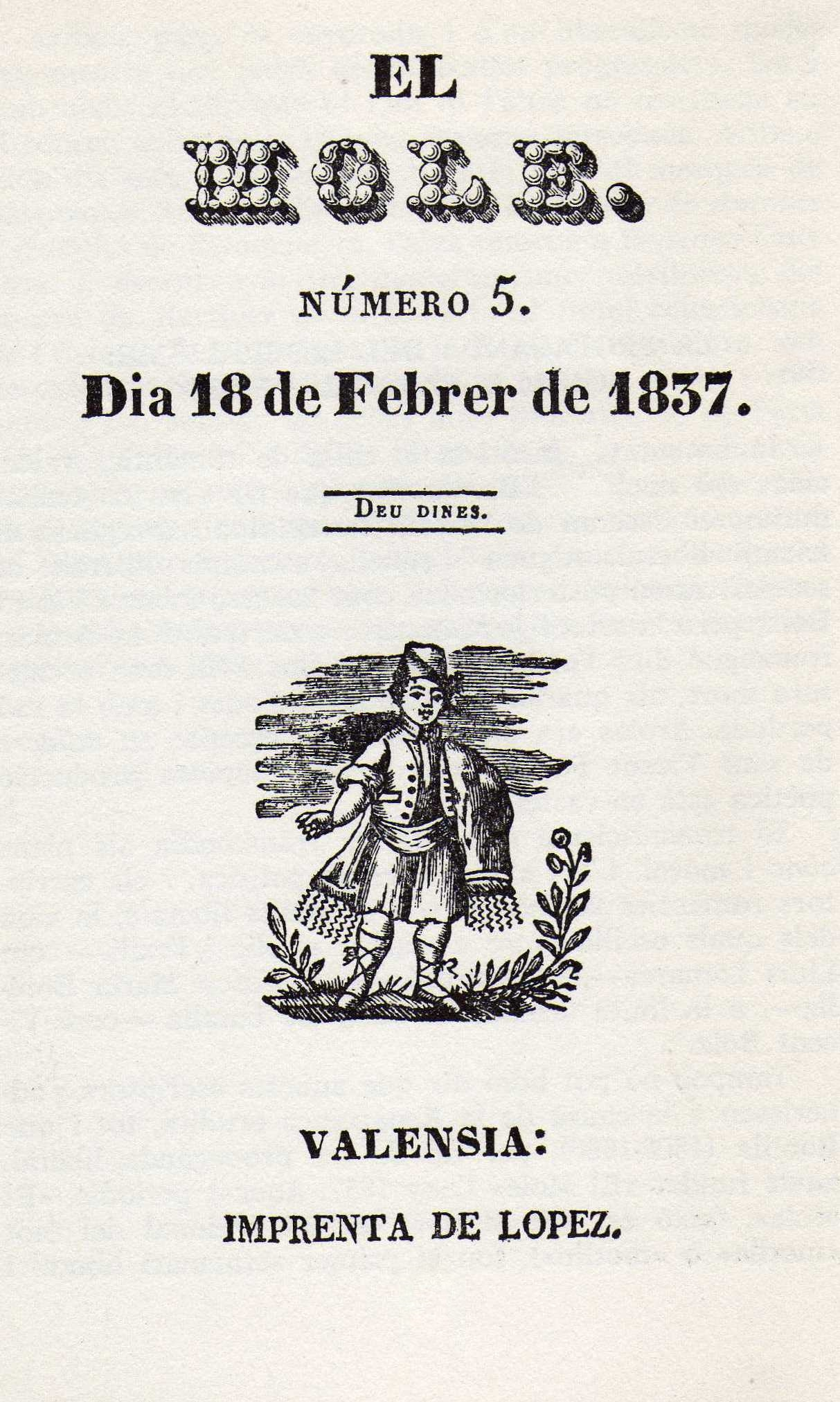 Portada de la revista "El MOle" nro. 5, del 18 de febrero de 1837 (tomado de copia facsímil de El sector progressista de la Renaixença valenciana, Manuel Sanchis Guarner, 1978)